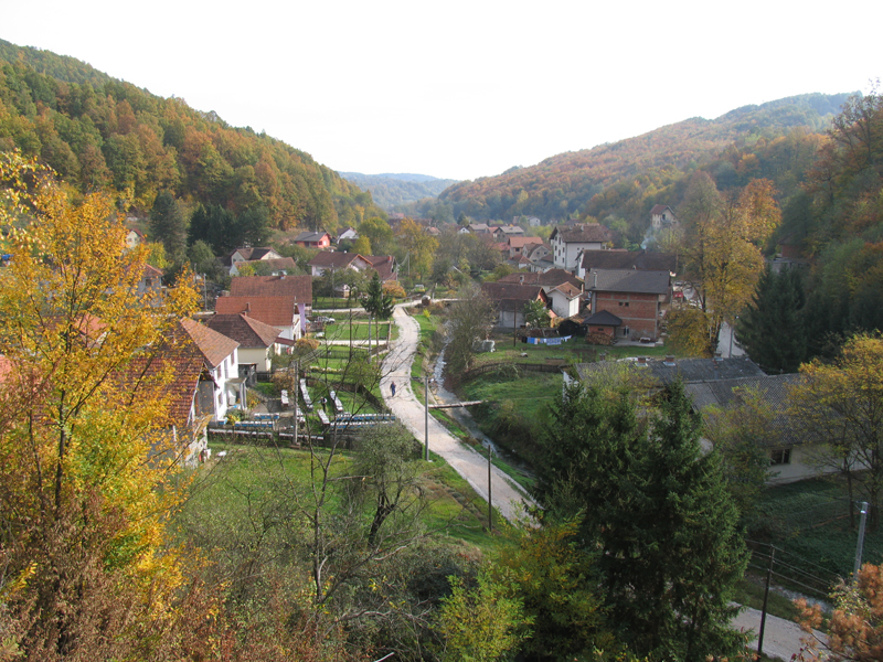 Vitinički Kiseljak (kod Zvornika) - panorama